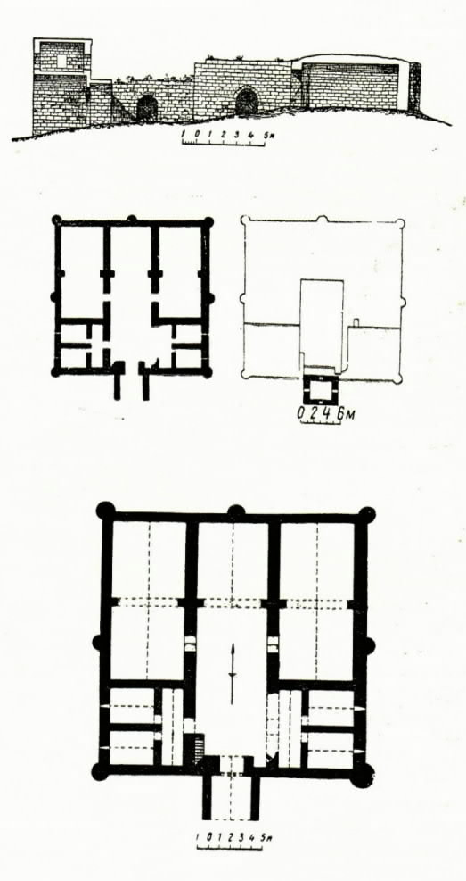 Qaraçı karvansarasının planı